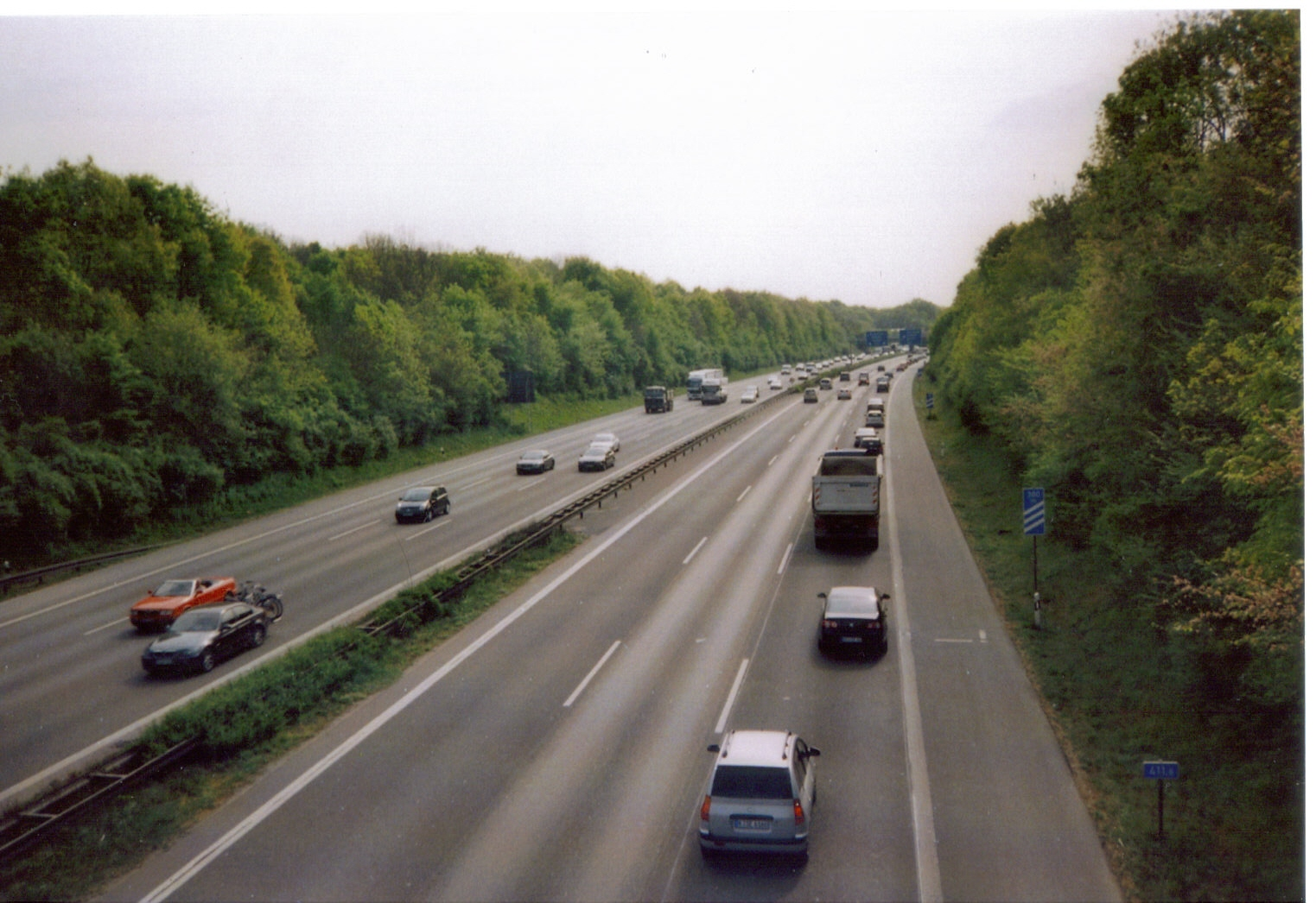 Köln-Lindweiler, A1